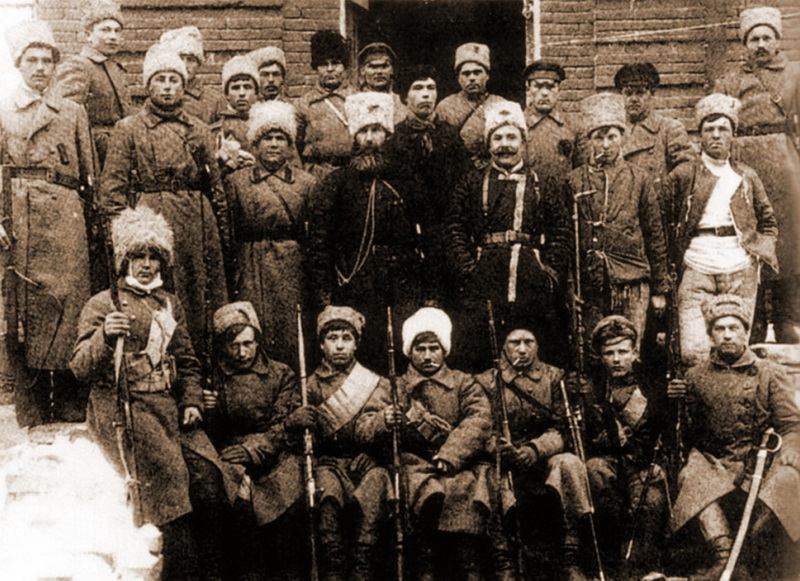 Бойцы одного из полков Объединенной партизанской армии Тамбовской губернии